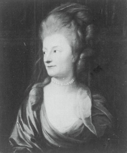 Иоганна-Генриетта-Луиза фон Карловиц (1717-1787), с 1749 года замужем за М. П. Бестужевым-Рюминым